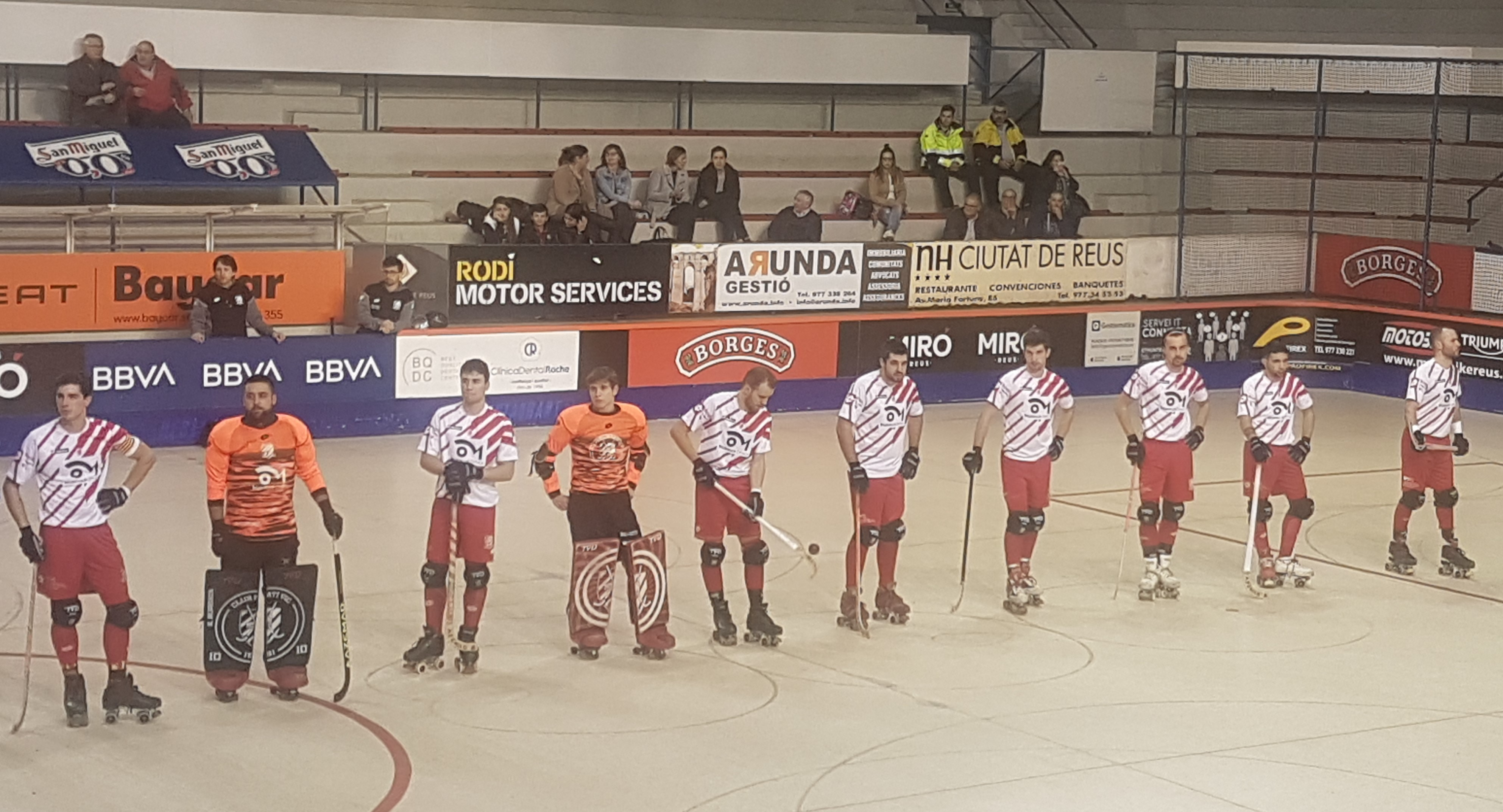 Plantilla Club Patí Vic